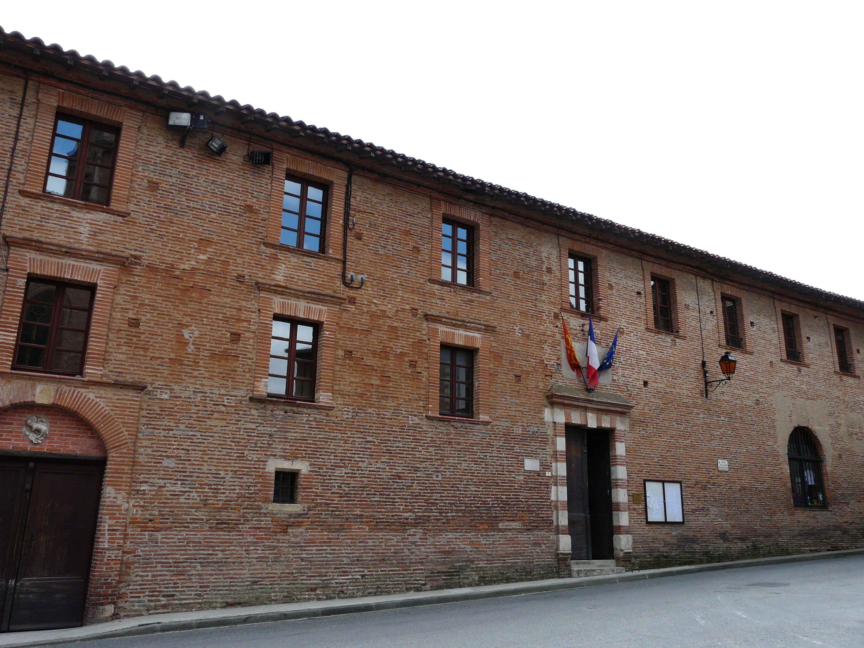 La mairie de Rieux-Volvestre, Haute-Garonne, France.